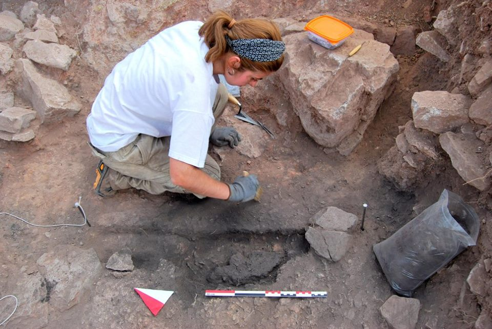 Imagen de la primera campaña de excavación del Cerro Bilanero en Alhambra (Ciudad Real, España) en la cual una estudiante voluntaria se dispone a intervenir en un hogar de la Edad de Bronce.